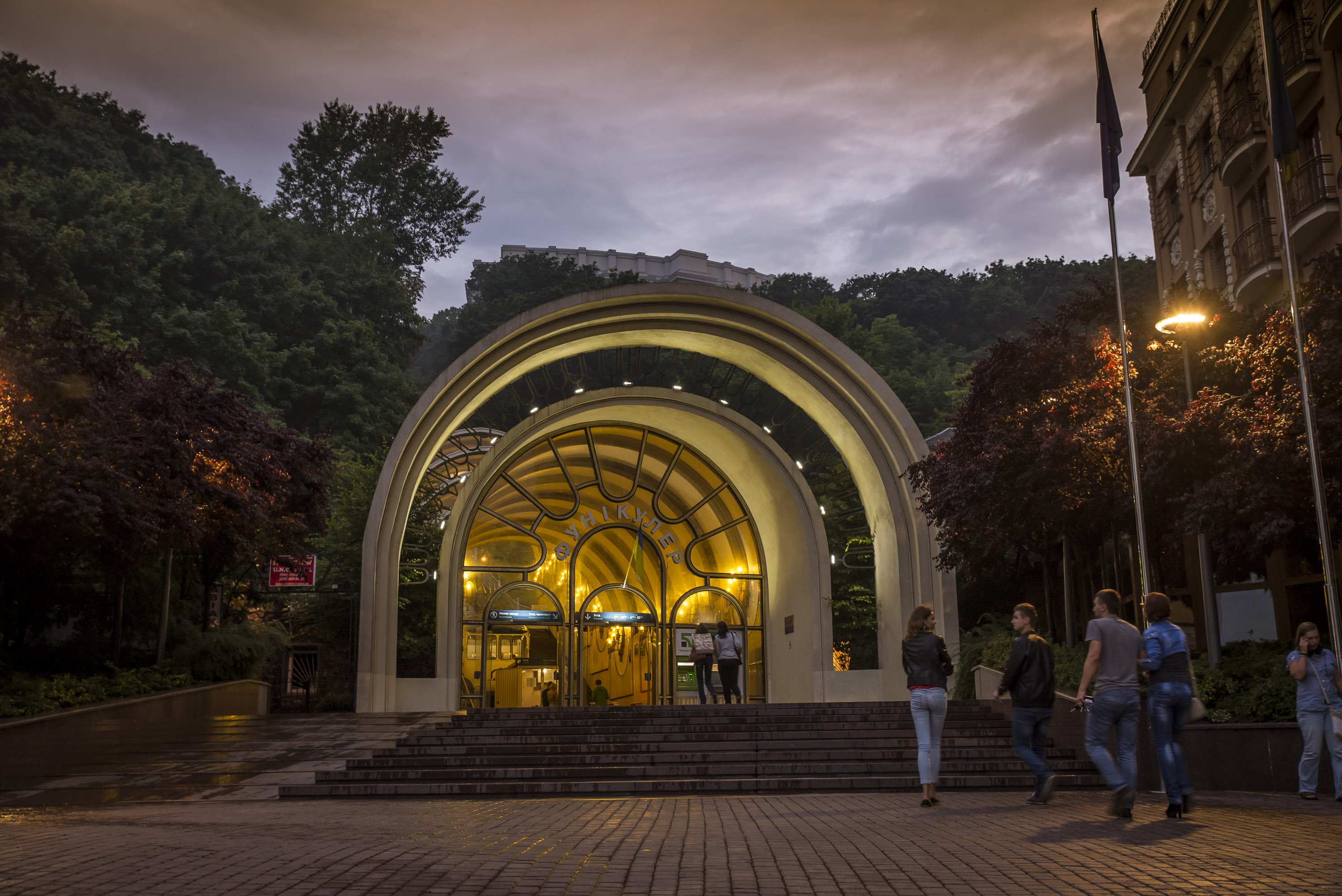 Михайлівський механічний підйом (фунікулер), Київ, Поштова пл.